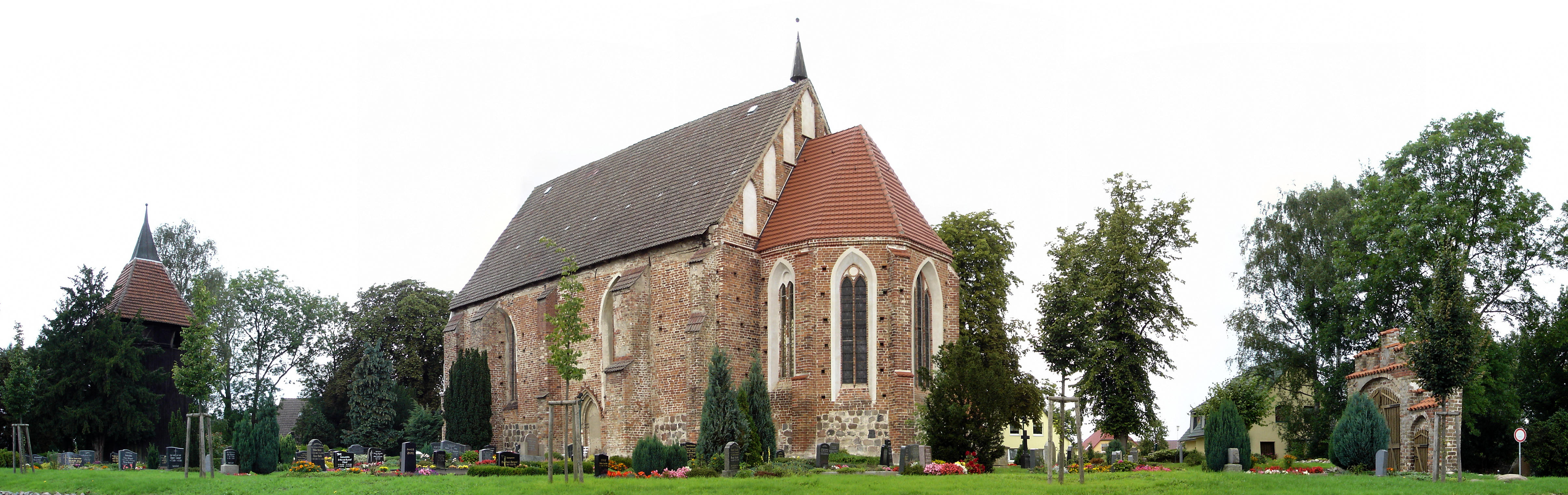 Kirche Bentwisch/ Church Bentwisch